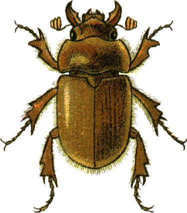 This file has been extracted from another file: Jacobs27.jpg